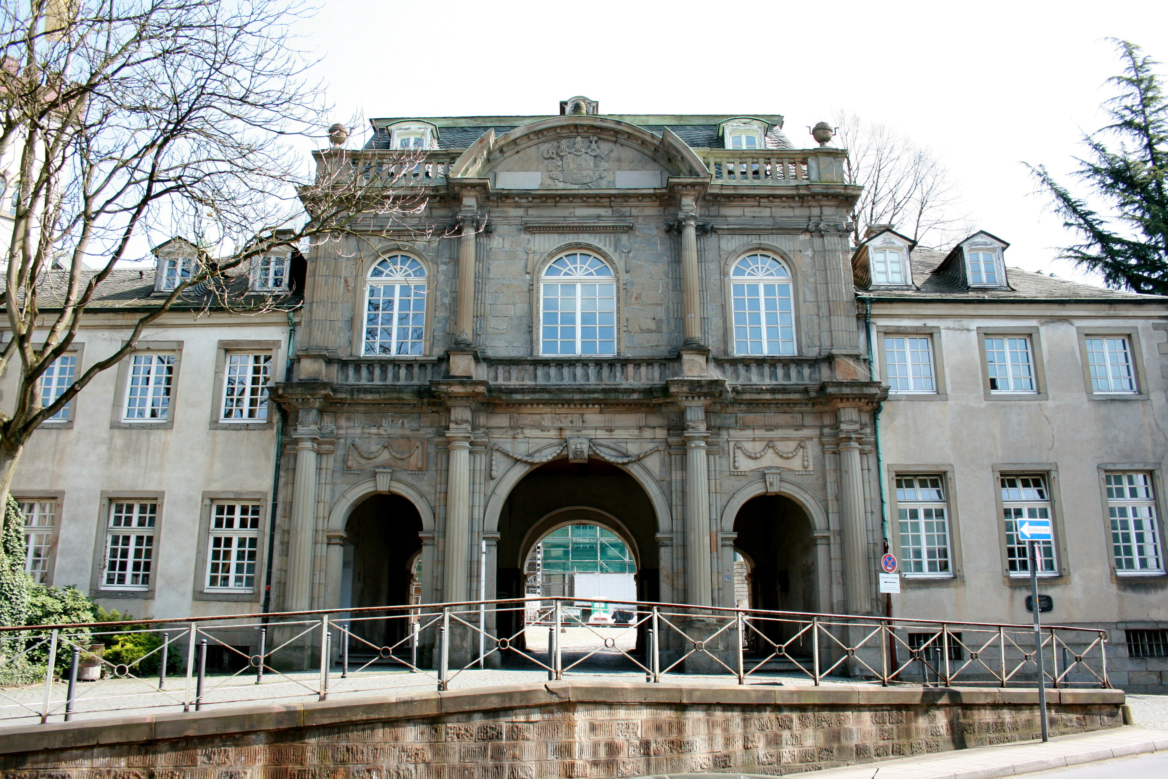 Folkwang-Hochschule, Kloster Werden, Essen-Werden